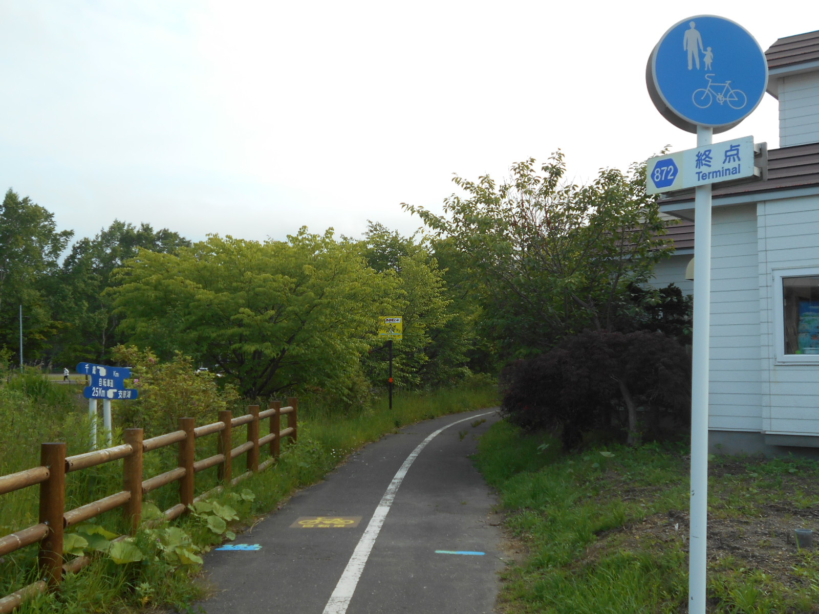 北海道道872号支笏湖公園自転車道線終点 北海道千歳市春日町2丁目